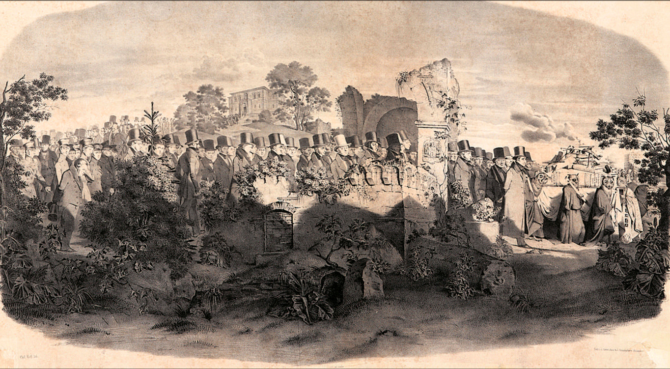 Diese – leider nur sehr gering aufgelöste – Reproduktion einer Lithografie aus dem Jahr 1842 erinnerte an die Abschaffung der unter Kaiser Karl V. 1532 erlassenen und bis zum Jahr 1840 geltenden Peinlichen Halsgerichtsordnung, der sogenannten Carolina, die zur Zeit des Königreichs Hannover 1840 durch das neue Strafgesetzbuch ersetzt wurde. Nachdem der Maler Karl Hoff, mutmaßlich im Auftrag des Grafen von Schwicheldt-Flachstöckheim, eine große Kohlezeichnung angefertigt hatte (die sich heute im Bomann-Museum in Celle findet), erschien diese verkleinerte und seitenverkehrte Lithografie aus der Druckerei von Julius Giere im Verlag der Celler Buchhandlung von Friedrich Capaun-Karlowa. Das originale Blatt ist wie folgt untertitelt: „Die Totenfeier der Carolina, Zur Erinnerung an Celle und die Zeitgenossen des Königl. Hannover. Patents vom 8.ten Aug. 1840. Carl Hoff lith./Verl. von Fr. Capaun in Celle/Gedr. i. d. Giereschen Hof-Steindruckerei Hannover“ …